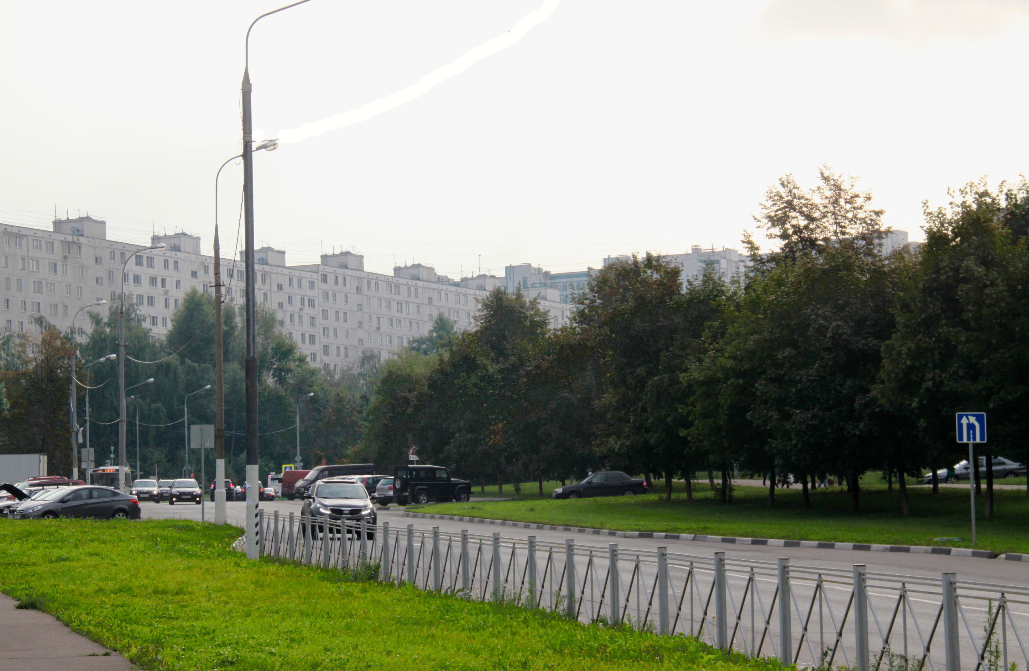 Шипиловская улица от Задонского проезда